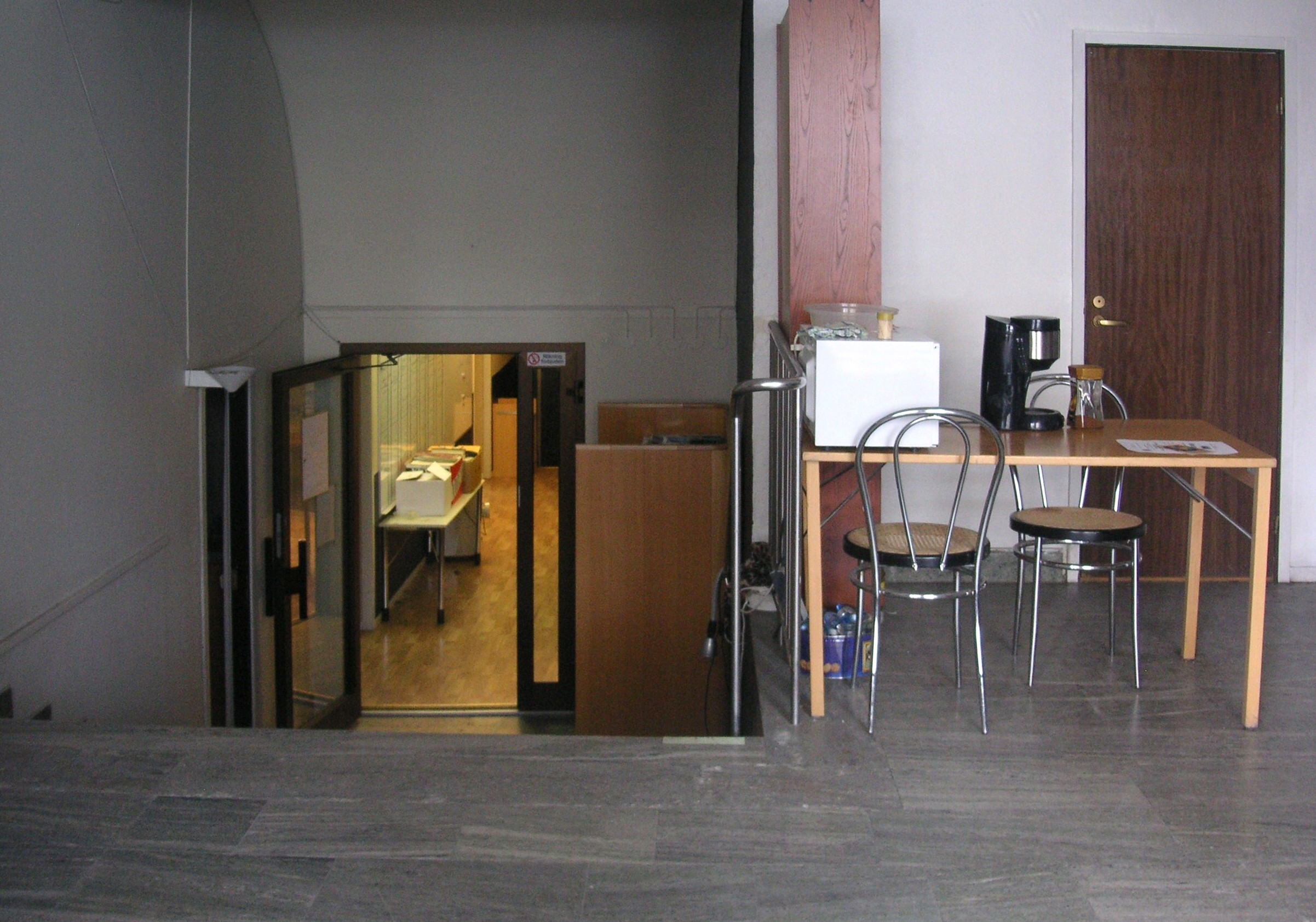 Före detta Biograf Orkanen på Stora Essingen